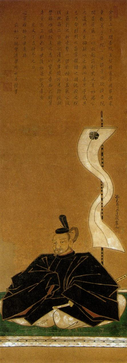 斎藤妙椿の肖像。